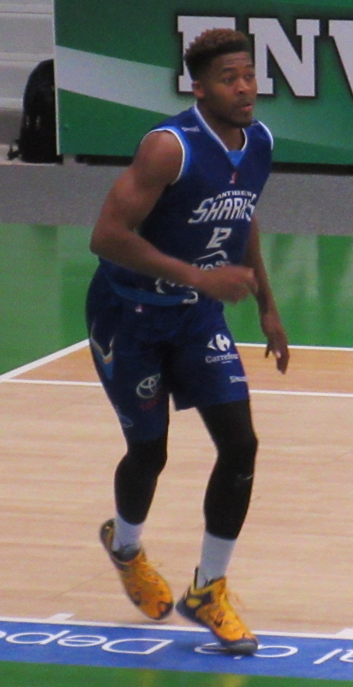 Kenny Gaines avec Antibes